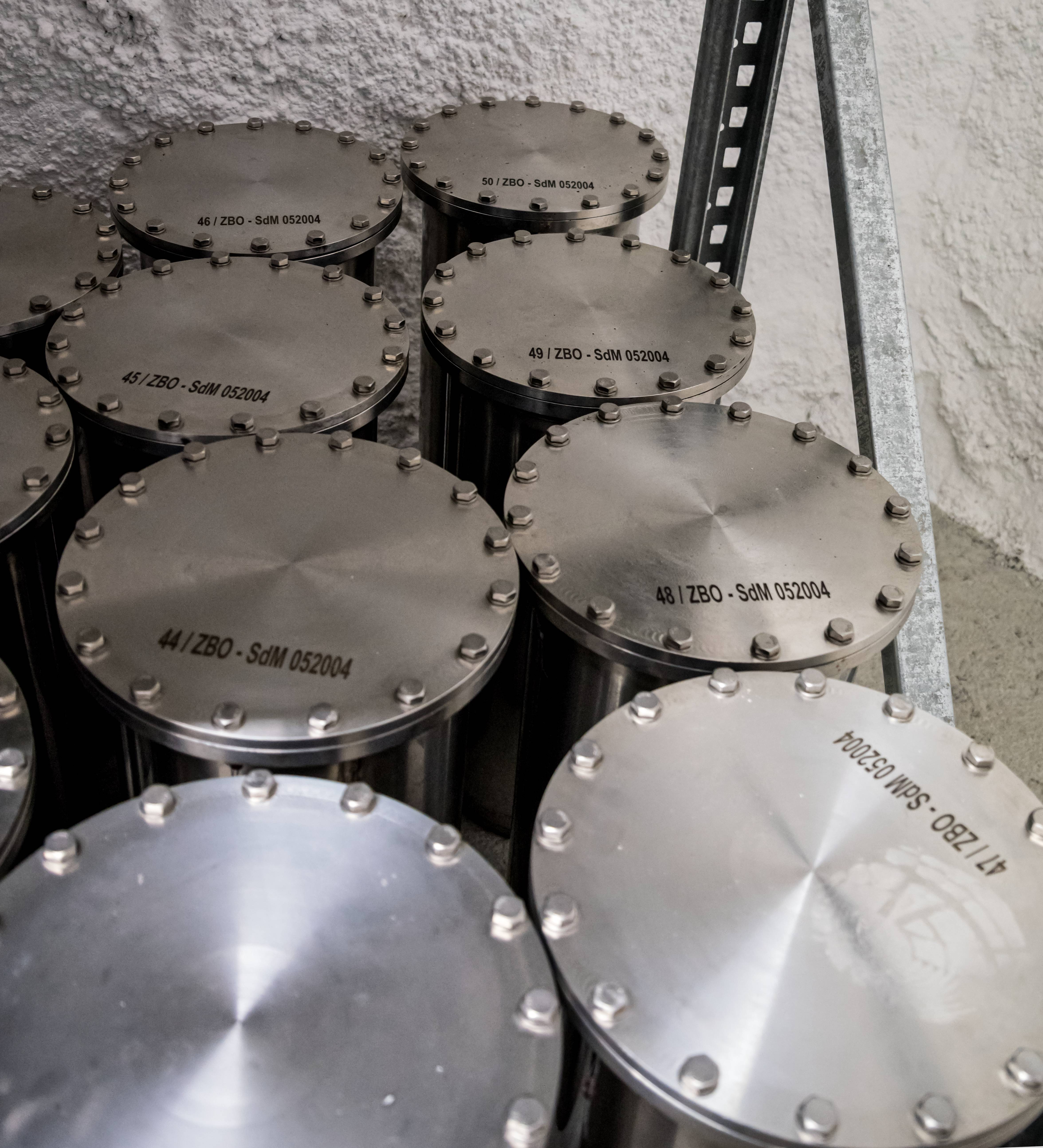 Der Barbarastollen ist der Zentrale Bergungsort der Bundesrepublik Deutschland zur Lagerung von fotografisch archivierten Dokumenten mit hoher national- oder kulturhistorischer Bedeutung. Er ist in Europa das größte Archiv zur Langzeitarchivierung. Die Bilder sind im Rahmen einer Führung des Bundesamts für Bevölkerungsschutz und Katastrophenhilfe (BBK) entstanden - Wikipedia Stammtisch,das 113. Treffen am 30. Mai 2016 Die Behälter der "Subduktive Maßnahmen ZBO - SdM 052004". Es wurden Werke von 50 Künstlern eingelagert Diese sind auch die einzigen Behälter die auch verplomt sind. Sie dürfen in 1500 Jahren also im Jahre 3504 eingesehen werden.